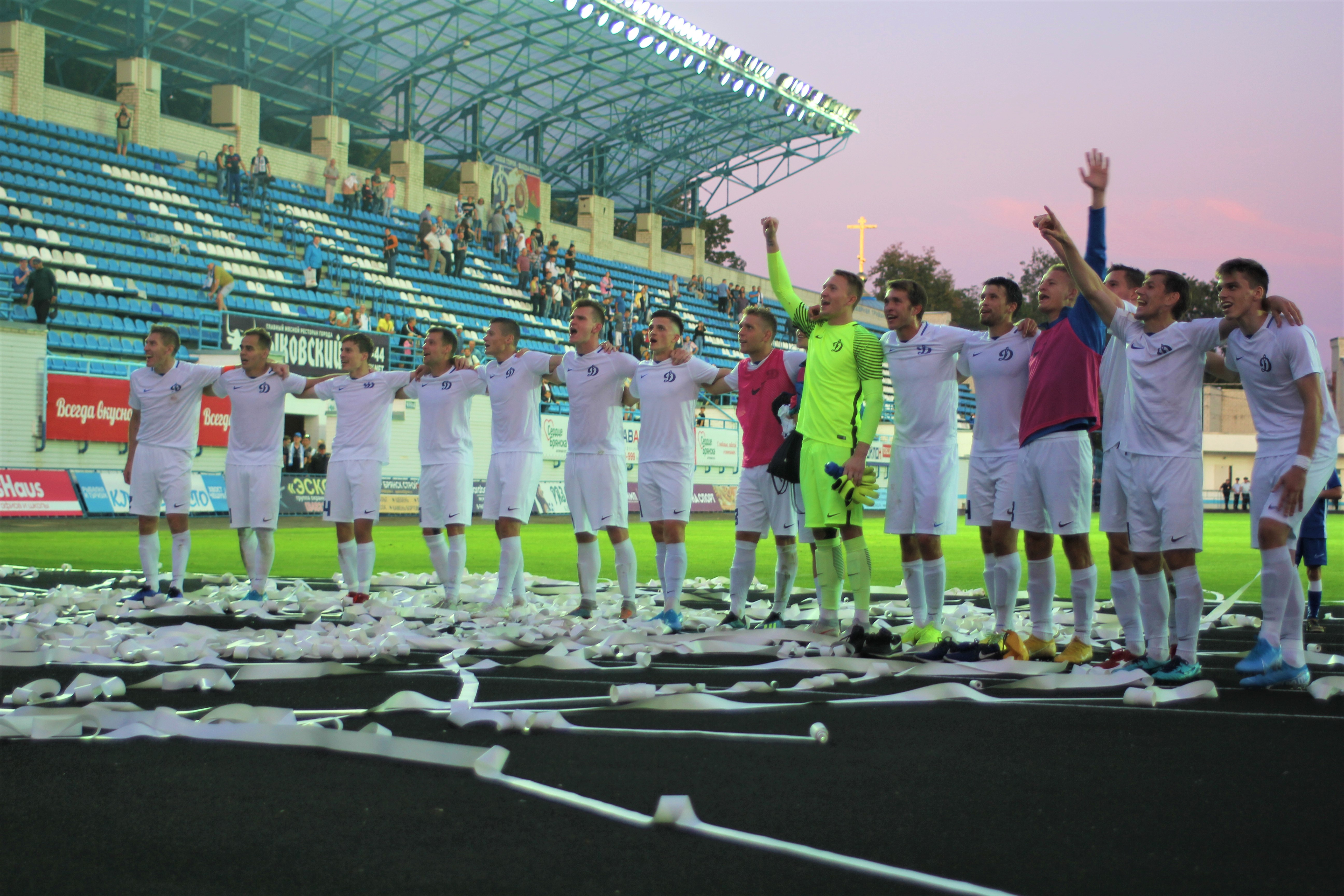 Победный матч